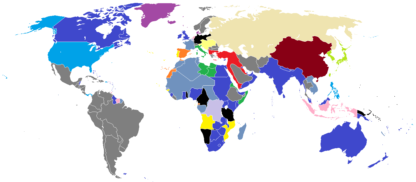 Cette carte décrit l'étendue des empires coloniaux des différents États en 1912. empire colonial / protectorats / dépendances de l'Empire russe empire colonial / protectorats / dépendances des Pays-Bas empire colonial / protectorats / dépendances de la Belgique empire colonial / protectorats / dépendances du Danemark empire colonial / protectorats / dépendances du Royaume-Uni empire colonial / protectorats / dépendances de la France empire colonial / protectorats / dépendances des États-Unis empire colonial / protectorats / dépendances de l'Italie empire colonial / protectorats / dépendances du Japon empire colonial / protectorats / dépendances du Portugal empire colonial / protectorats / dépendances de l'Espagne empire colonial / protectorats / dépendances de l'Empire ottoman empire colonial / protectorats / dépendances de la Chine empire colonial / protectorats / dépendances de l'Allemagne